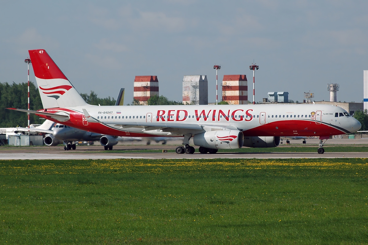 RA-64047 (cn 1450743164047)